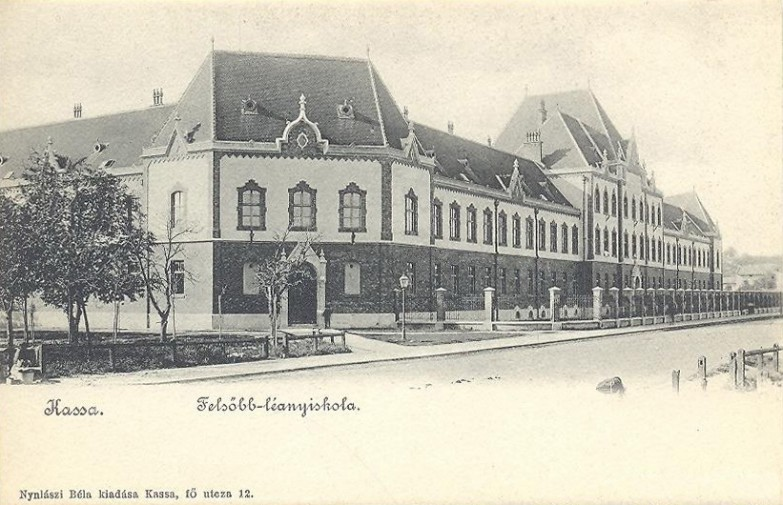 Fotografia Gymnázia okolo roku 1900